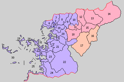 愛媛県北宇和郡の町村制時点の町村。